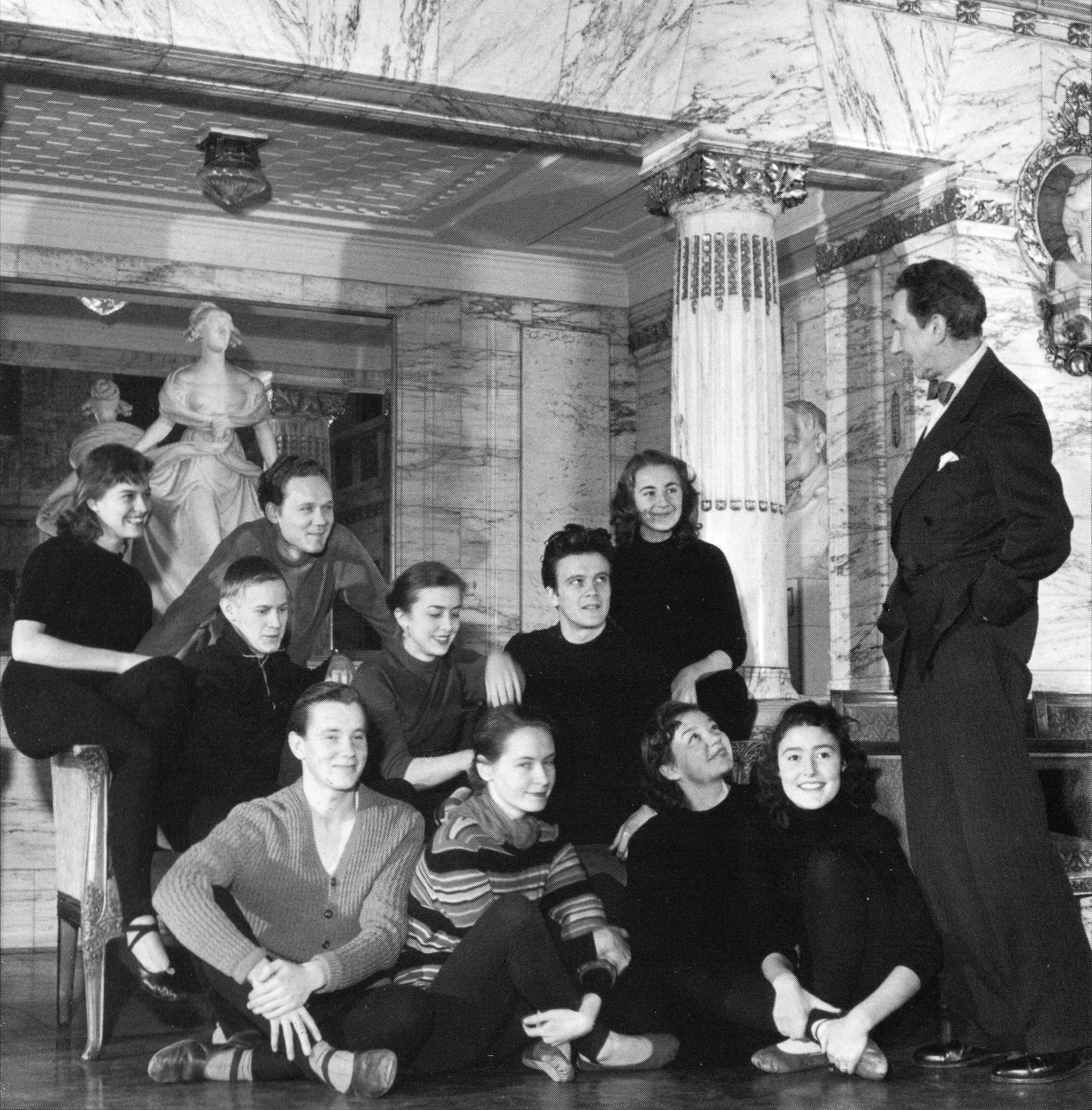 Publicerad i: Luterkort, I. (1998). Om igen, herr Molander!: Kungl. Dramatiska teaterns elevskola 1787-1964. Stockholm: Stockholmia. s. 127. Bildtext vid publiceringen 1998: "Första årskursen 1950–1951. Fr.v. Elsa Prawitz, Jan Malmsjö, (snett nedanför), Olof Thunberg, Berit Gramér, Gunnar Hellström, Pia Arnell, Tage Severinson, Silvija Bard, Ulla Sjöblom, Öllegård Wellton, Olle Hilding föreståndare. Teaterhögskolan i Stockholm." Även publicerad i: Göranzon, M. & Malmsjö, J. (2012). Scenens lust och magi: Marie Göranzon, Jan Malmsjö, två skådespelare : i samtal med Lena S. Karlsson. Stockholm: Spencer. s. 20. Bildtext vid publiceringen 2012: "Elevskolans första årskull 1950–51 i Marmorfoajén. Övre raden från vänster: Elsa Prawitz, Jan Malmsjö, Olof Thunberg, Berit Gramér, Gunnar Hellström, Pia Arnell. Sittande: Tage Severin, Silvija Bardh, Ulla Sjöblom, Öllegård Wellton. Stående till höger: Olle Hilding, lärare och föreståndare vid Dramatens elevskola under åren 1948–1953."